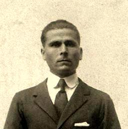 Pere Sastre Obrador, més conegut com a Pere de Son Gall (Llucmajor, 1895 - Llucmajor, 1965). Part d'una fotografia familiar realitzada al voltant del 1920.